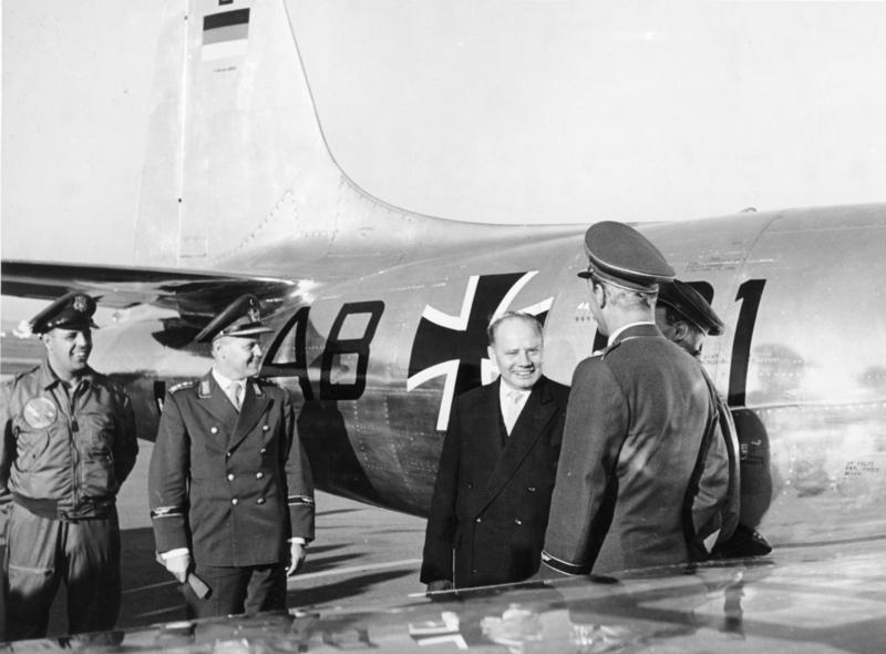 Note: This description has been identified as biased or incorrect: ("DDR-Propaganda"). Zentralbild 26.9.1956 Westdeutsche Düsenjäger mit Eisernem Kreuz als Hoheitszeichen Als eine "Wiedergeburt der deutschen Luftwaffe" bezeichnete der ehemalige Nazi-Kommandeur der Nachtjäger und jetzige Chef der westdeutschen NATO-Luftstreitkräfte, Generalleutnant Kammhuber, den ersten Start westdeutscher Düsenjäger, der sich am 24.9.1956 unter den Augen von Kriegsminister Blank auf dem NATO-Flugplatz Fürstenfeldbruck bei München vollzog. Die von den USA gelieferten Düsenjäger tragen als Hoheitsabzeichen ein stilisiertes Eisernes Kreuz, ähnlich dem Abzeichen der deutschen Kriegsflugzeuge im Ersten Weltkrieg. UBz: Kriegsminister Blank (Mitte); 1. Ltn. Ravella (links), Generalleutnant Kammhuber (2.v.links), beim Start des T33-Düsenjägers.